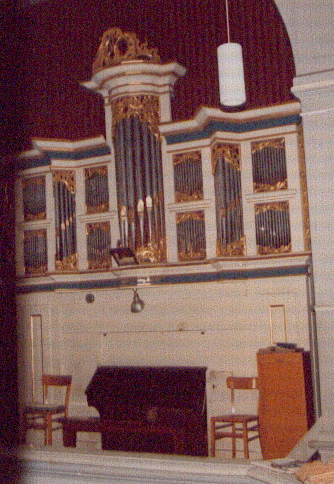 Röver-Orgel von 1895 in St. Marien Scharnebeck